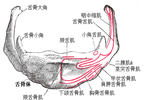 舌骨前表面放大图